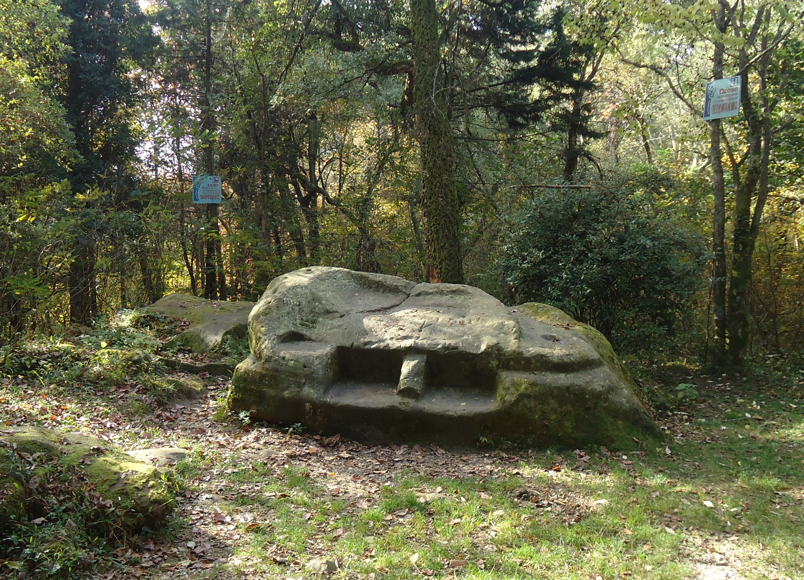 Кудепстинский культовый камень